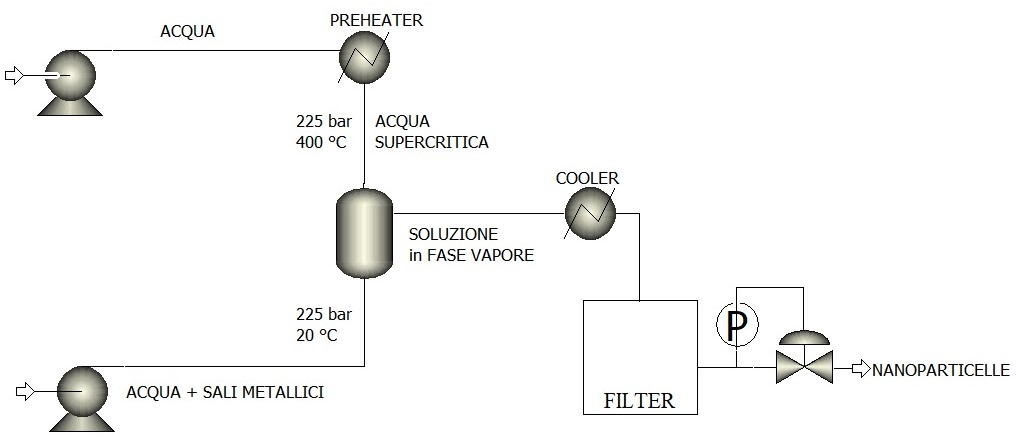 schema processo idrotermico per la produzione di nanoparticelle